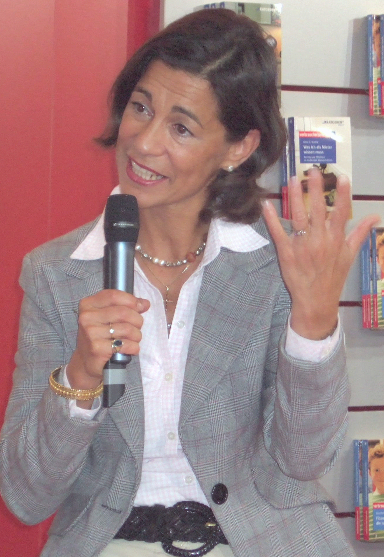 Dagmar von Cramm Aufnahme: 6.10.2006 Url